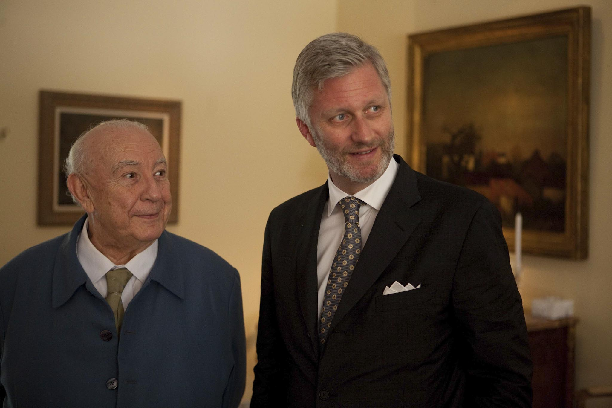 O ator brasileiro Sérgio Mamberti, à esquerda, e o príncipe Filipe da Bélgica, à direita, durante a assinatura do acordo para realização da Europalia-Brasil, na Embaixada da Bélgica em Brasília © Pedro França